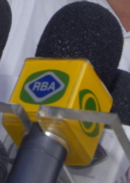 Detlahe de um microfone da emissora de televisão brasileira TV RBA